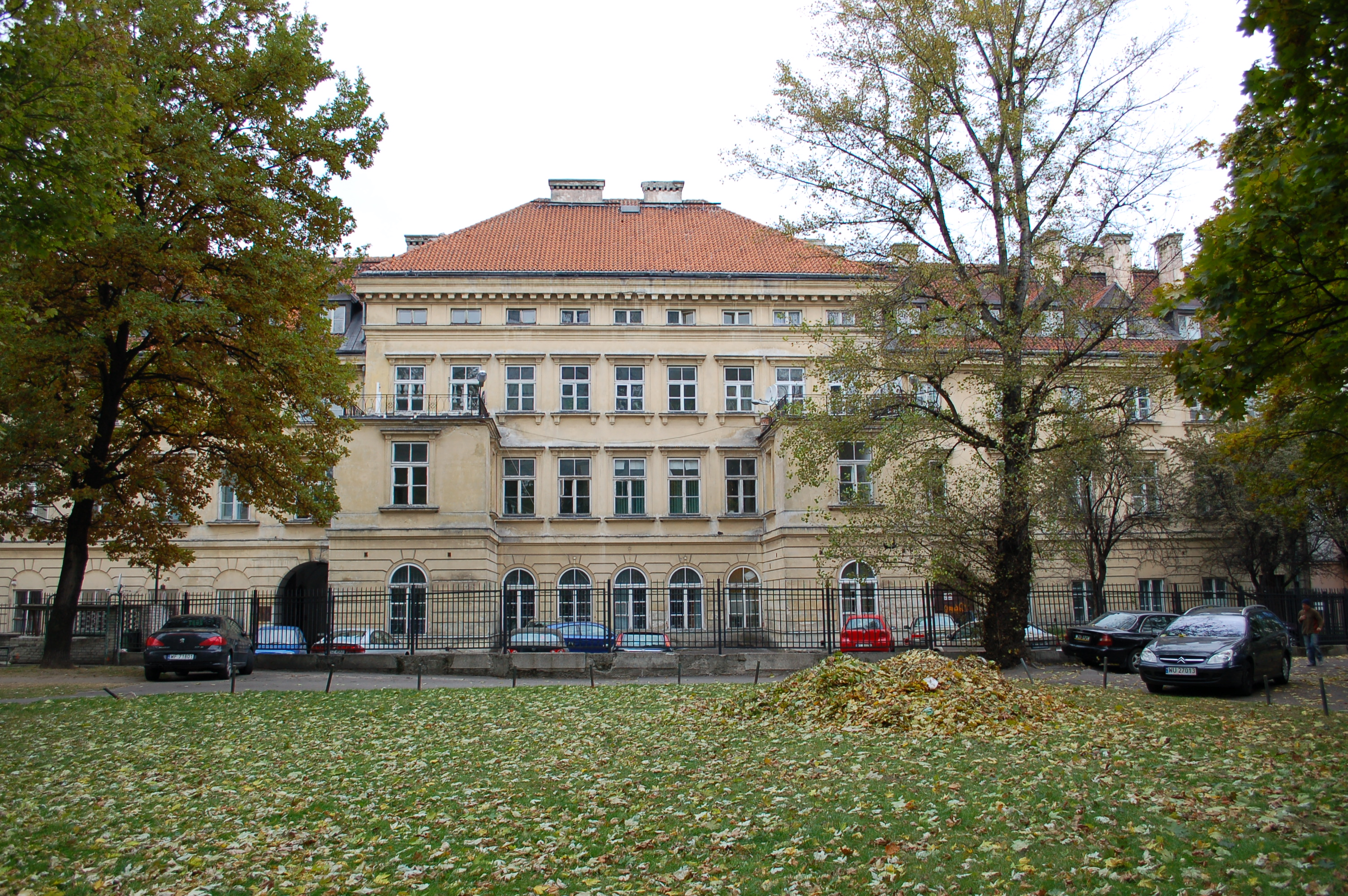 Długa, backside Hotel Polski